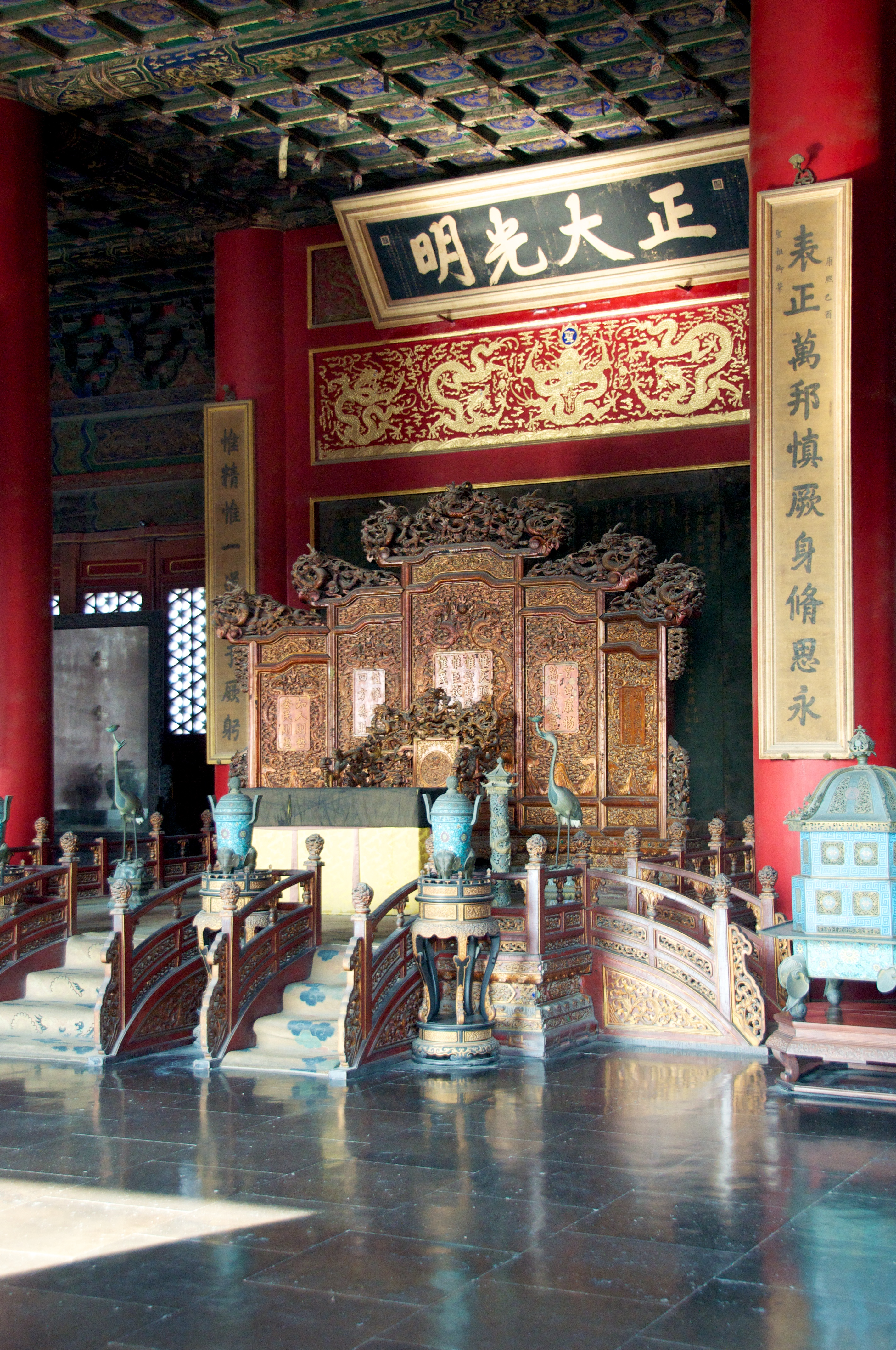 Forbidden City